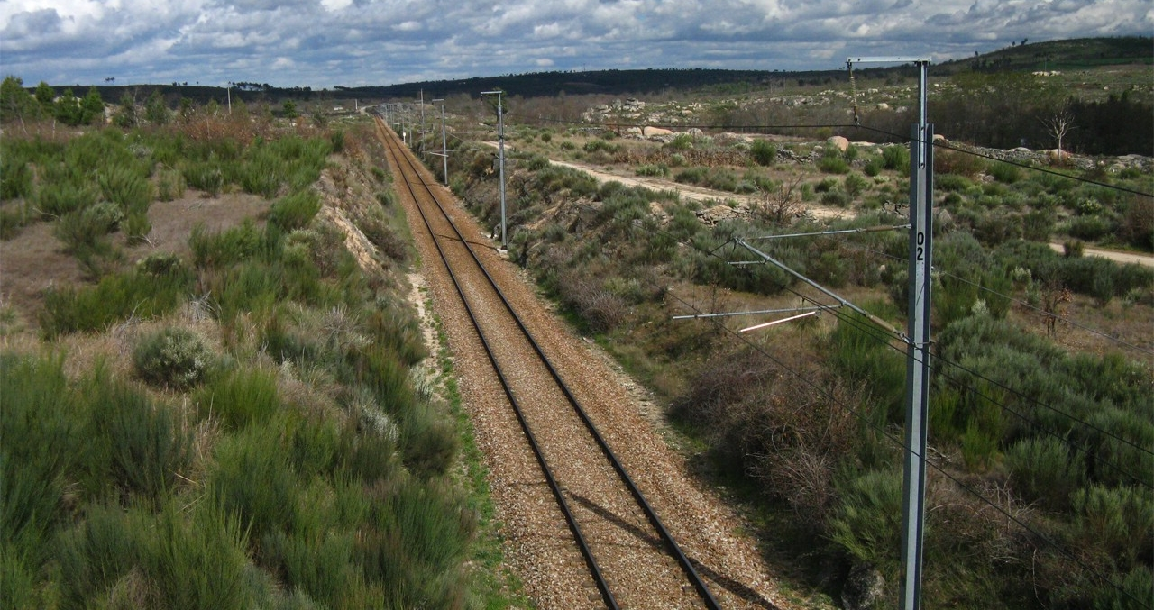 Linha da Beira Alta vista da passagem desnivelada, junto ao apeadeiro do Rochoso, sentido Vilar Formoso